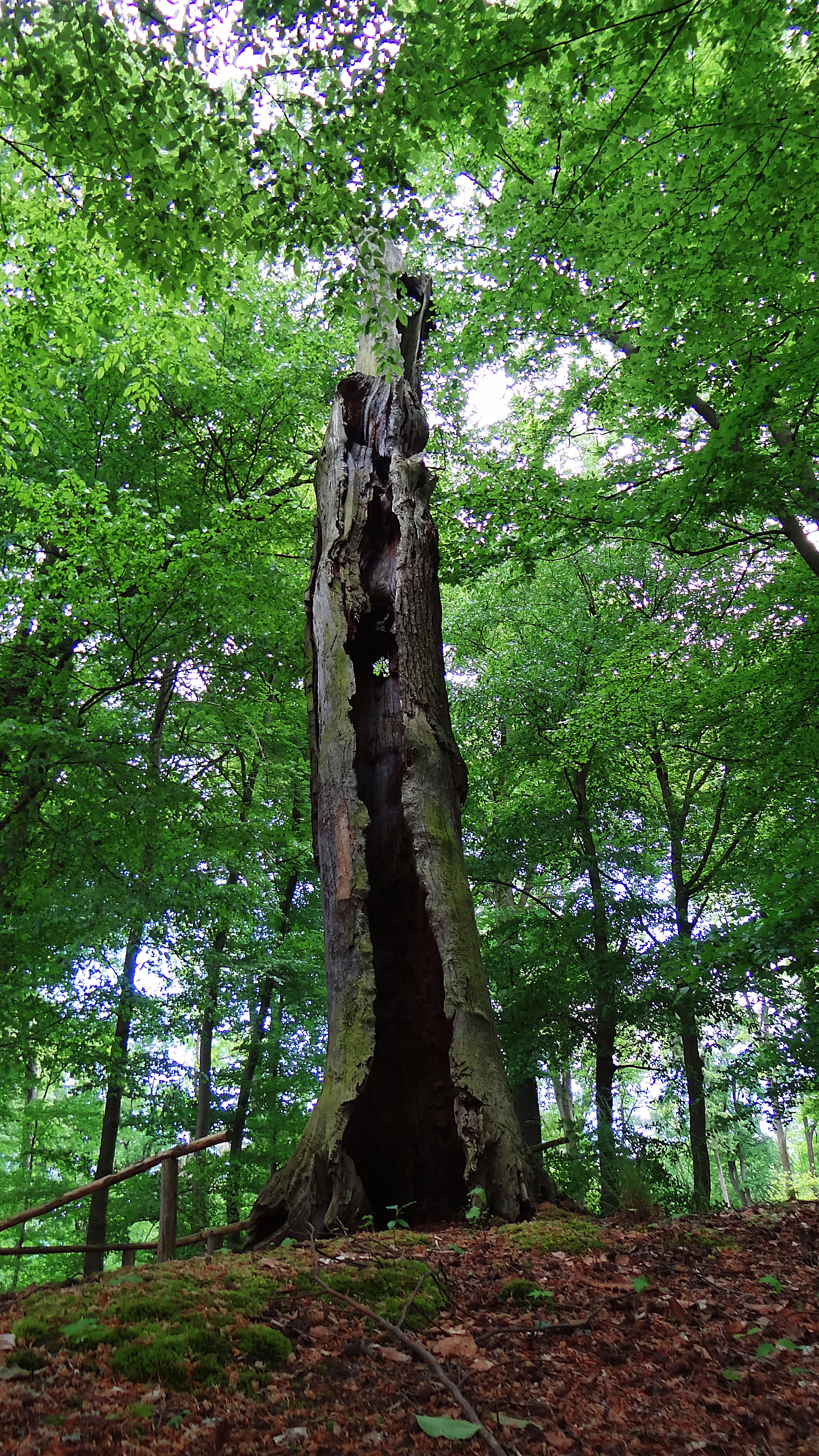 Friedrichseiche im Naturschutzgebiet Magdeburgerforth